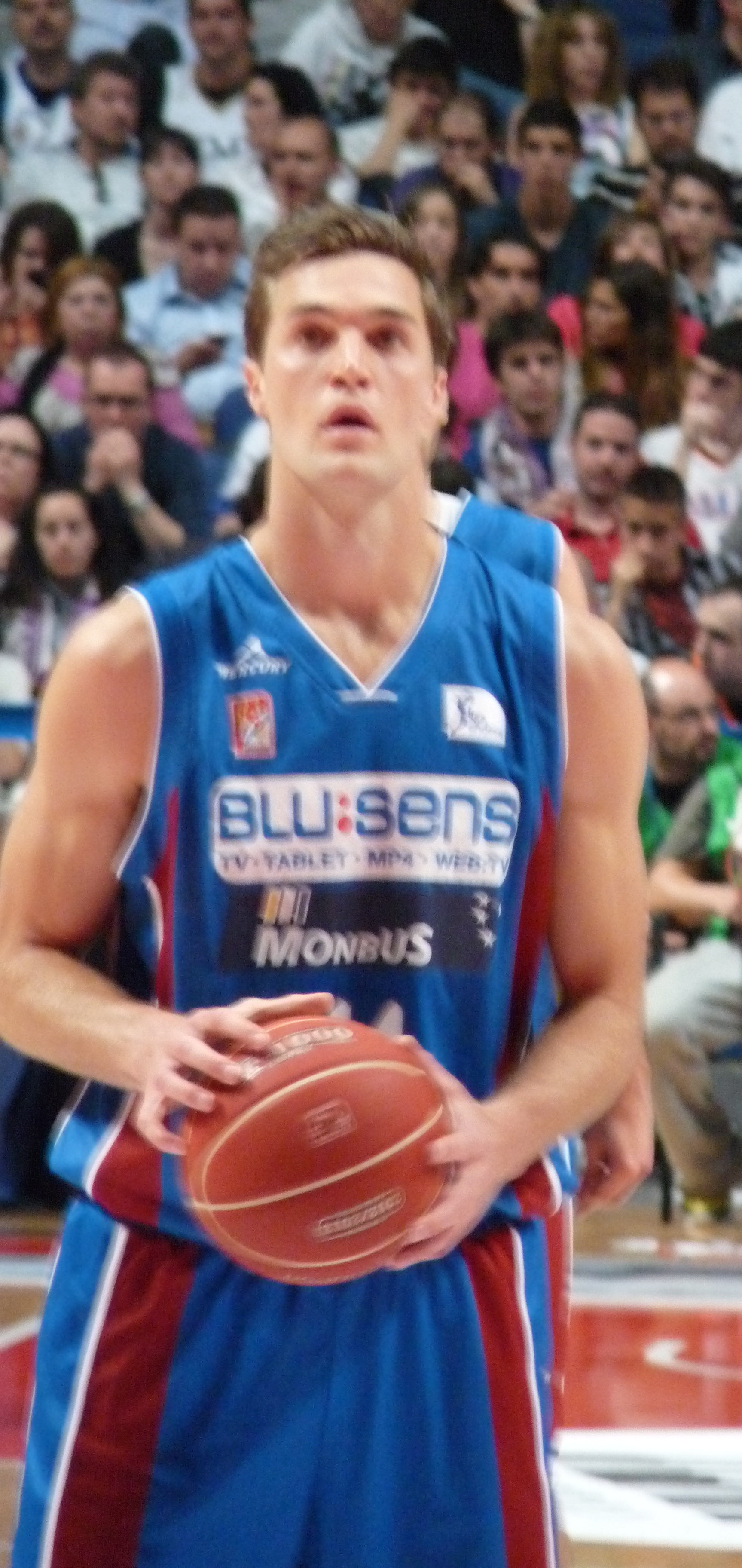 Levon Kendall